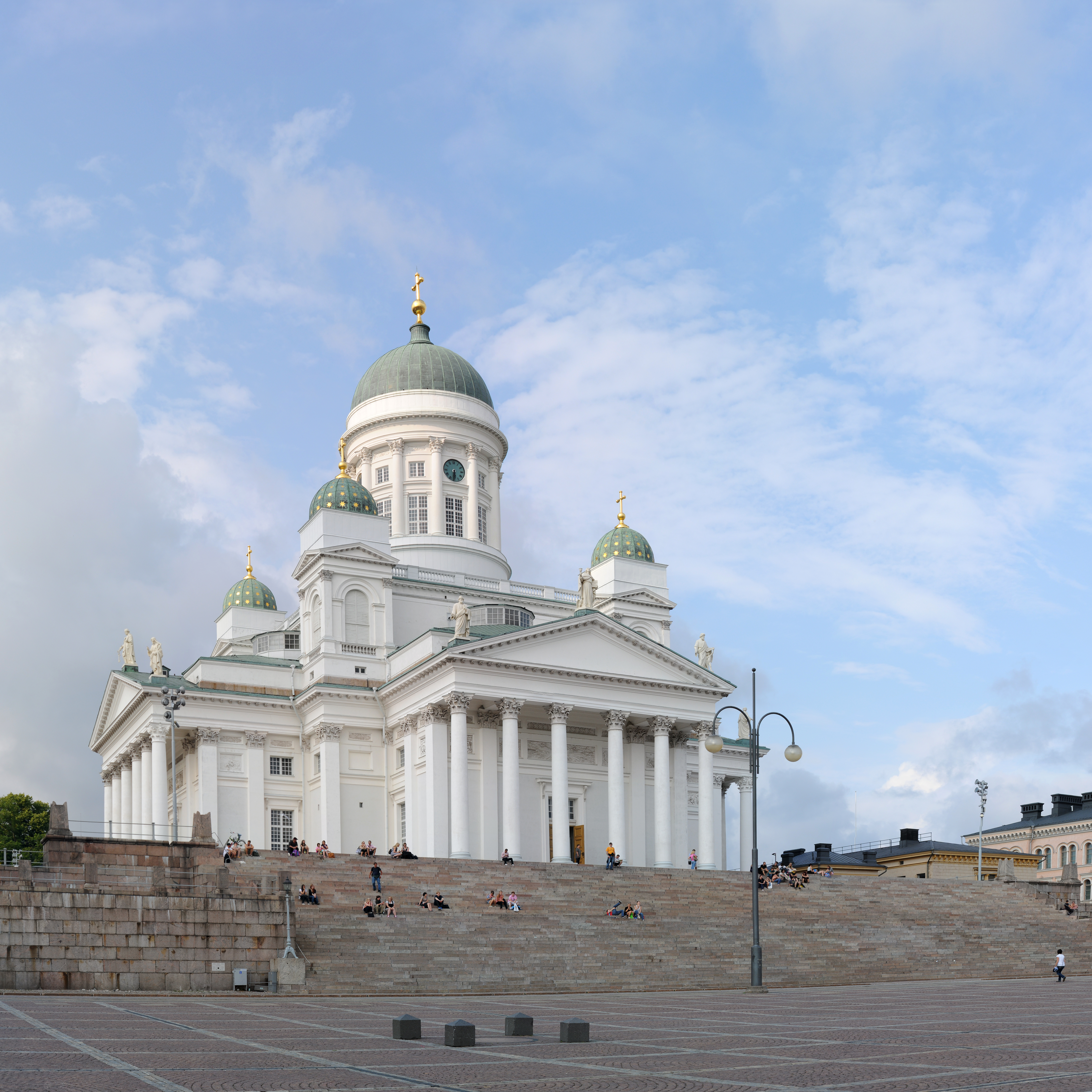 Senaatintori, Helsingin tuomiokirkko; Nikon D300s + 50.0-200.0 mm f/4.0-5.6; muodostuu 16 ruutua